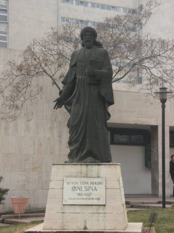 Ankara İbni Sina Hastanesi bahçesindeki heykel